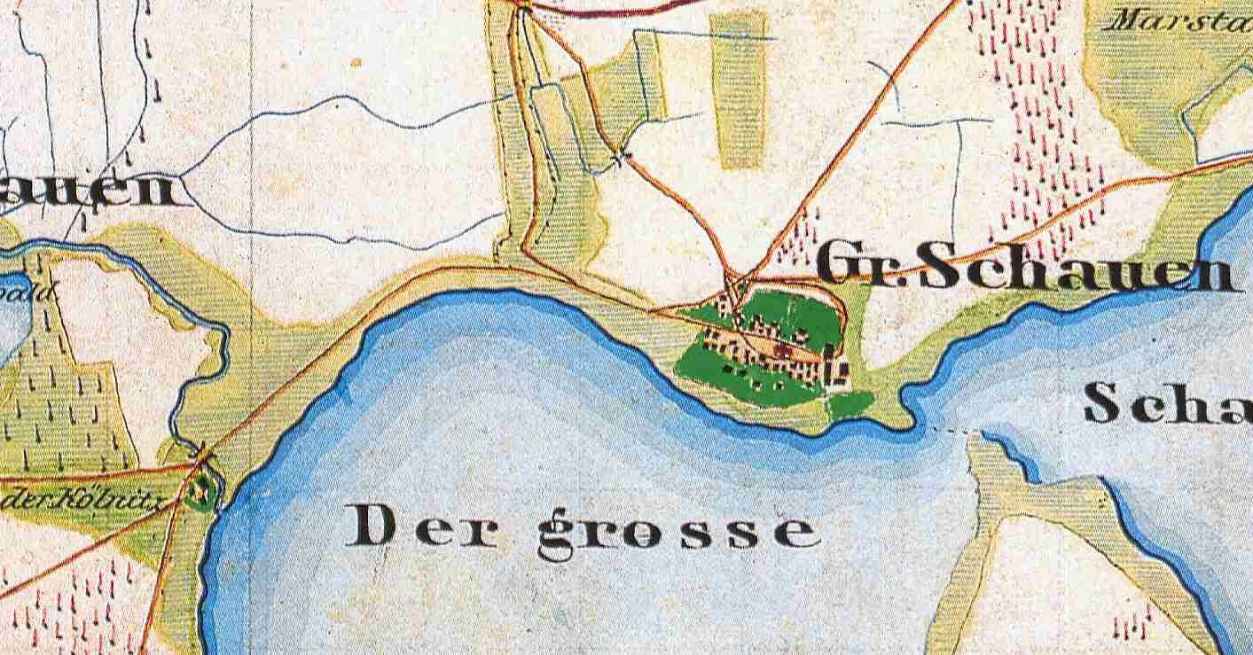 Groß Schauen, Ortsteil der Stadt Storkow (Mark), Lkr. Oder-Spree, Brandenburg, Deutschland, Ausschnitt aus dem Urmesstischblatt 3749 Storkow von 1844